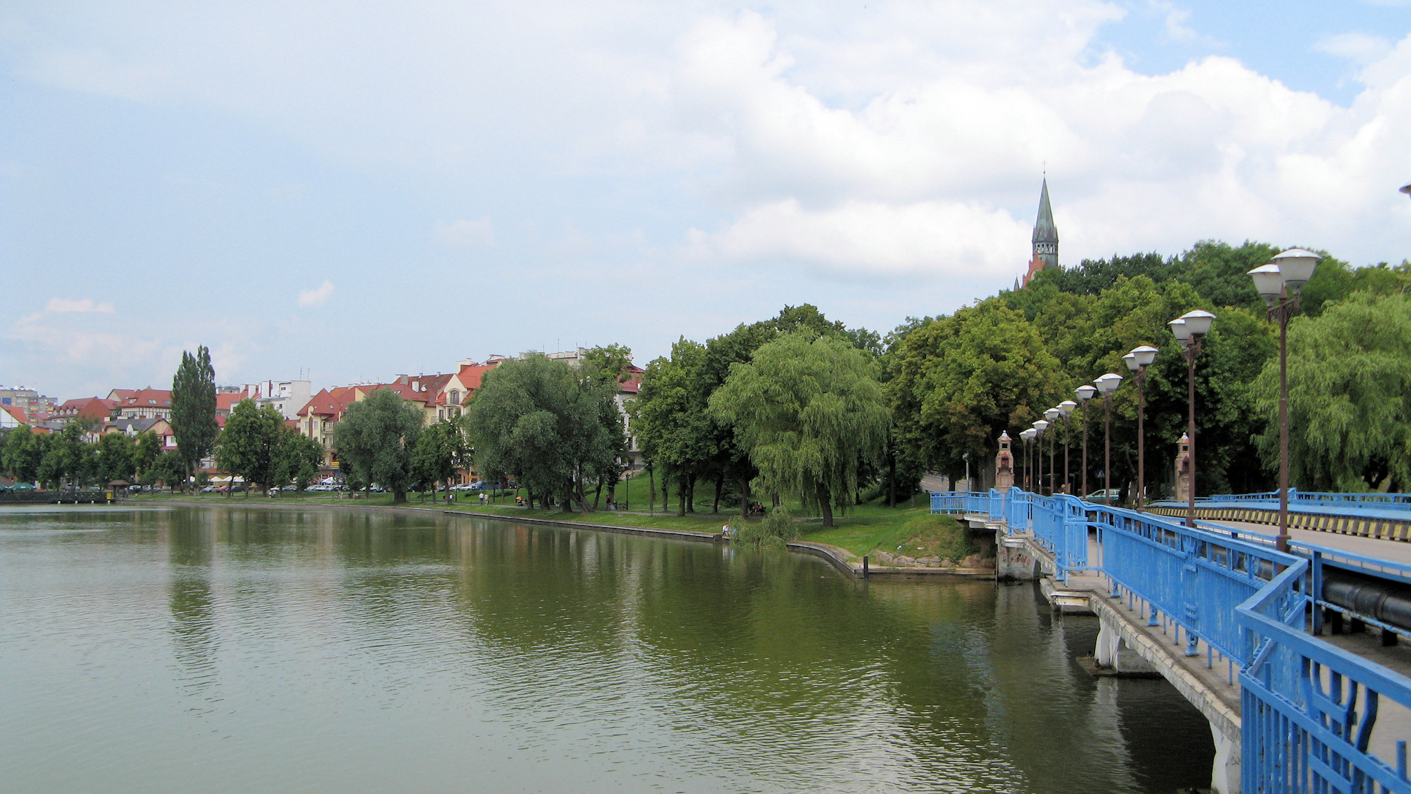 Panorama miasta Ełk